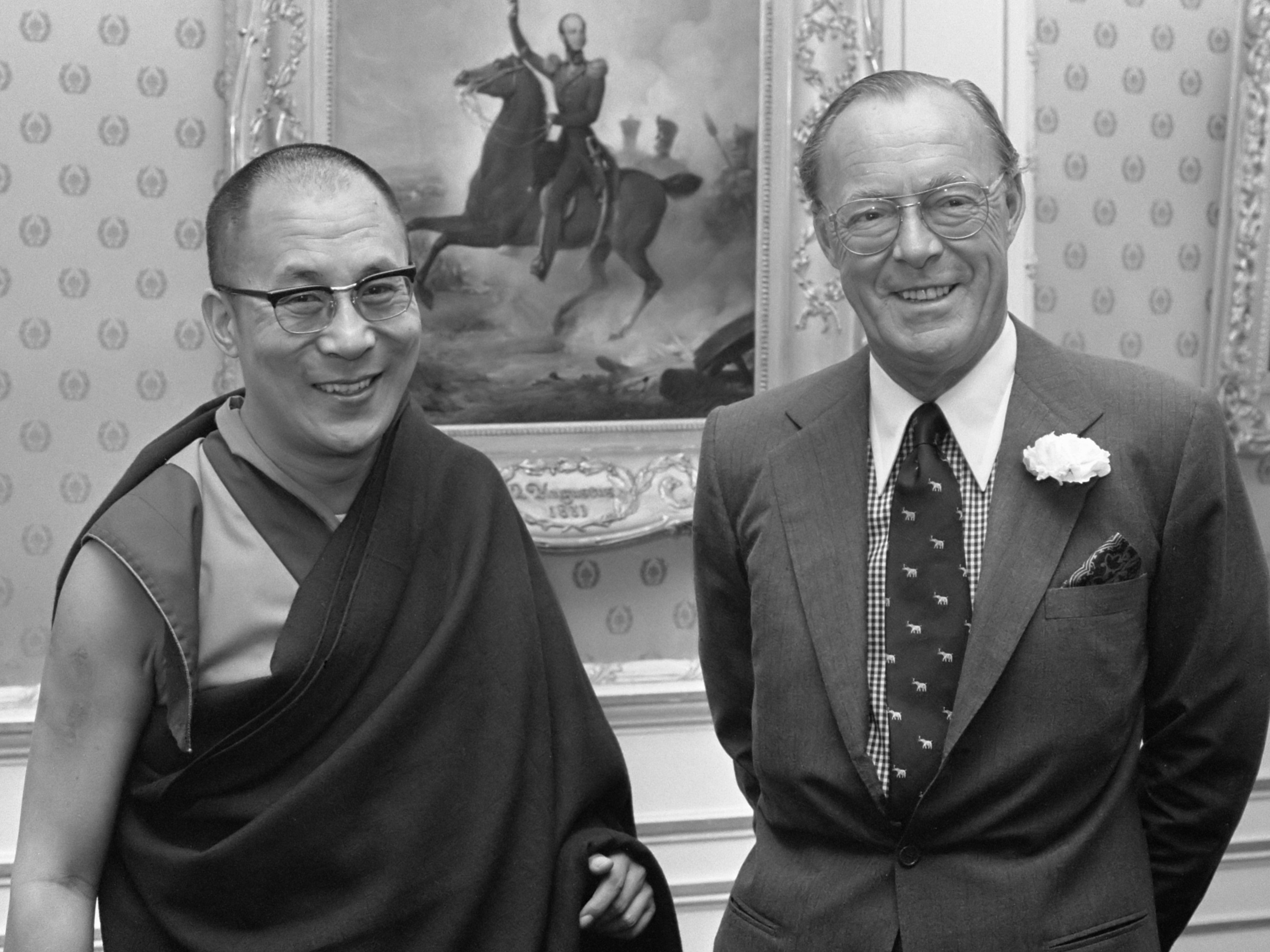 Prins Bernhard ontvangt Dalai Lama op Paleis Soestdijk 9 oktober 1973